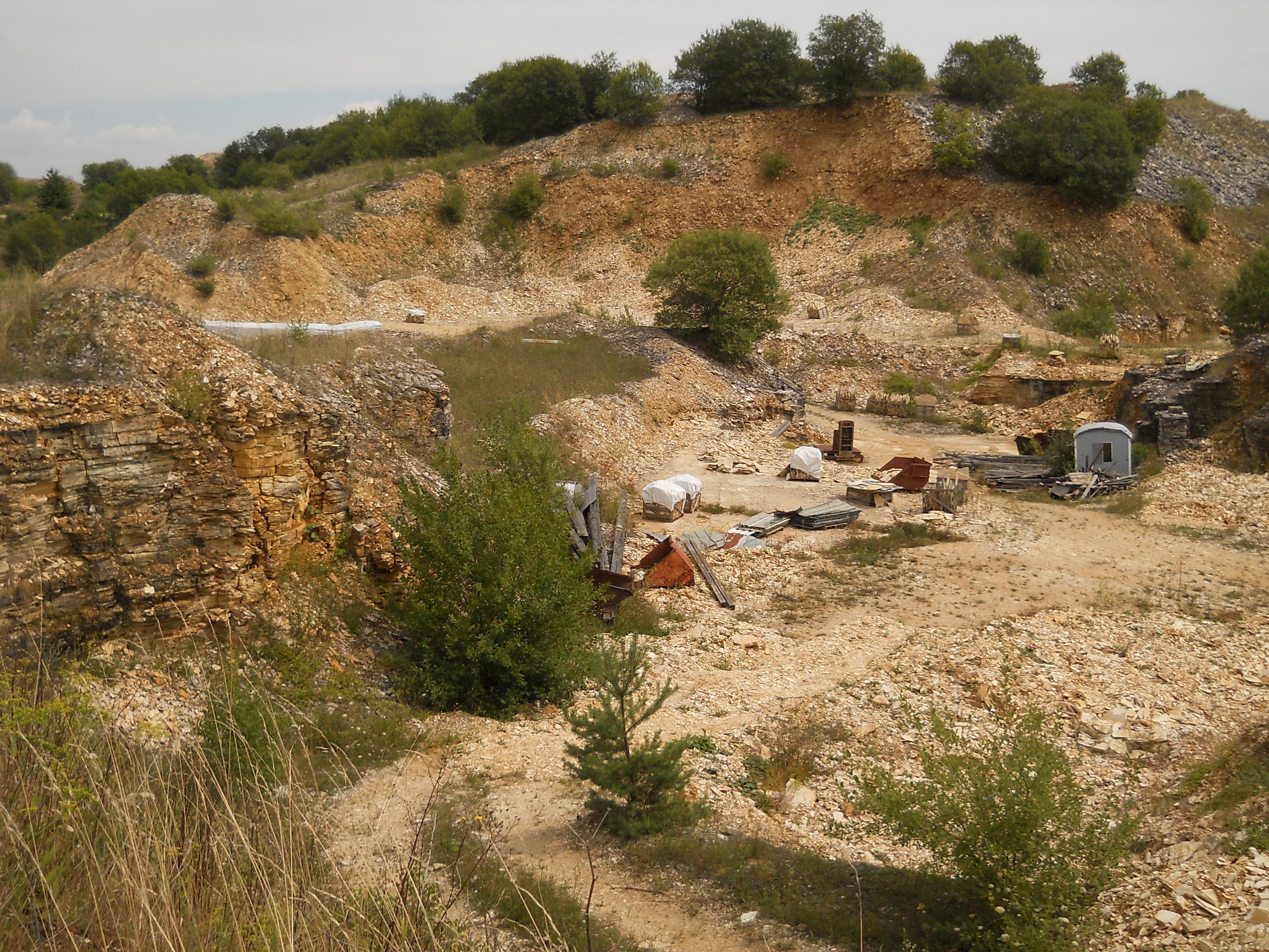 Jura-Steinbruch im Osten von Wintershof, einem Ortsteil von Eichstätt im oberbayerischen Landkreis Eichstätt